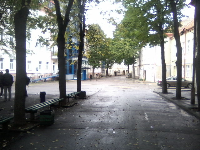 VGTU architektų rūmų vidinis kiemelis